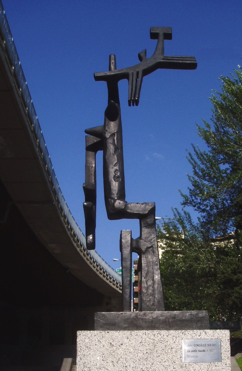 La petite faucille. Julio González. Museo Arte Público. Madrid. España